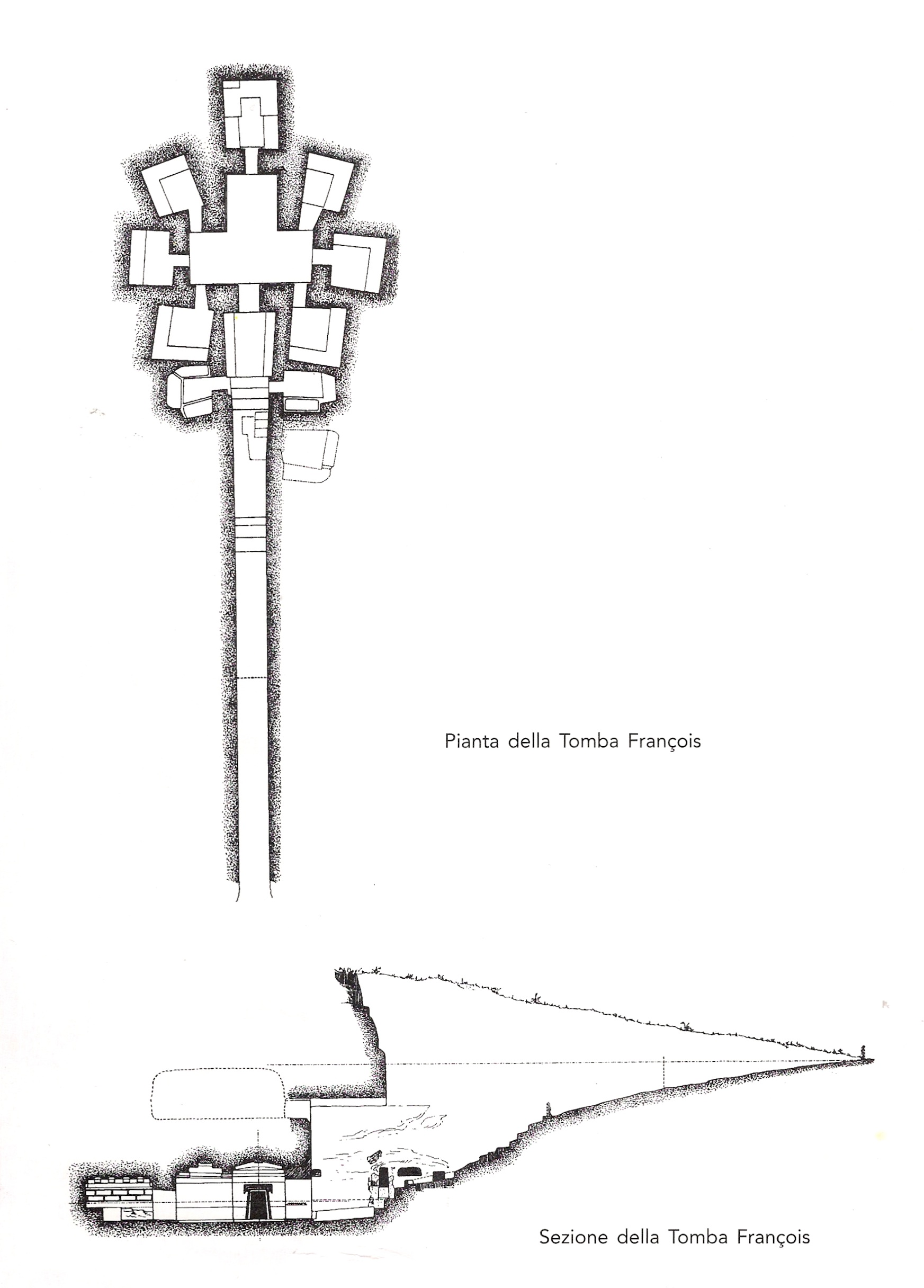 Plan de la Tombe François sur le site des nécropoles de Vulci